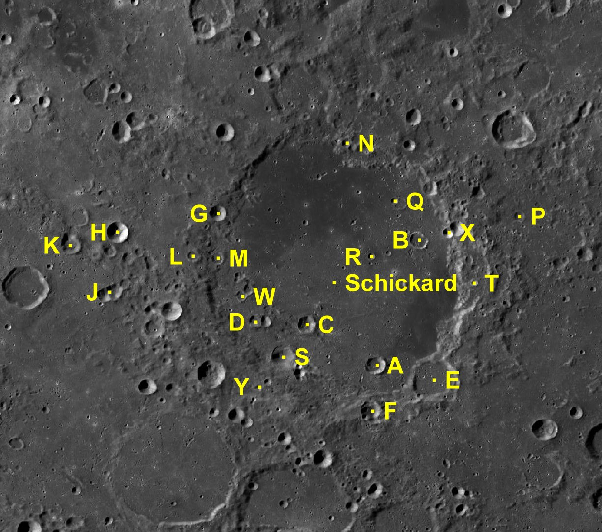 Cráter lunar Schickard. Cráteres satélite. (Imagen LRO)